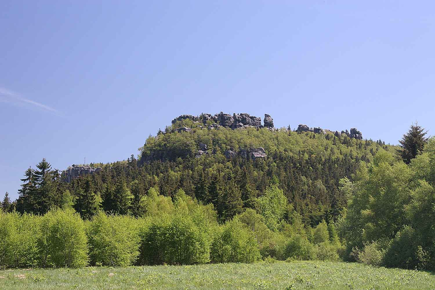 Malá Hejšovina - skalní město na vrcholu